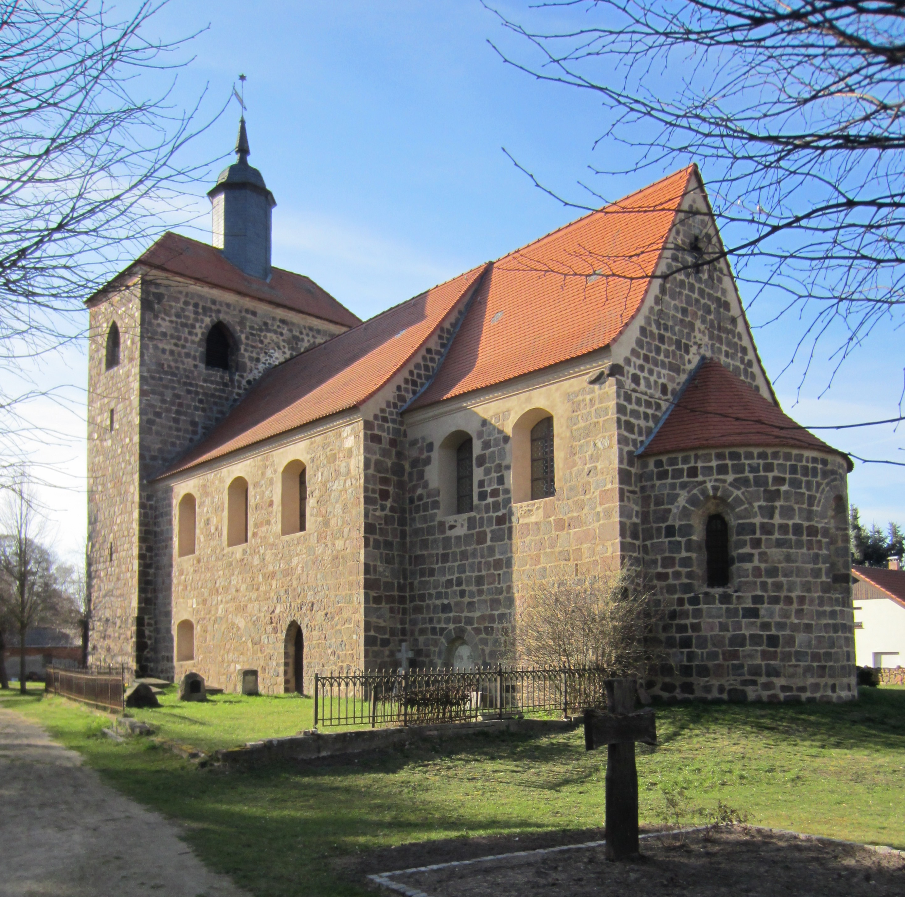 Waltersdorf, Gemeinde Heideblick, denkmalgeschützte Dorfkirche, Ansicht von Südosten